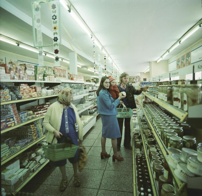 ADN-ZB/Link/2.2.79/Bez. Erfurt: Ländliches Einkaufszentrum des Gemeindeverbandes Berlstedt. Neben dieser modern eingerichteten Kaufhalle besteht in Berlstedt eine komplexe Annahmestelle des Dienstleistungskombinates Weimar.